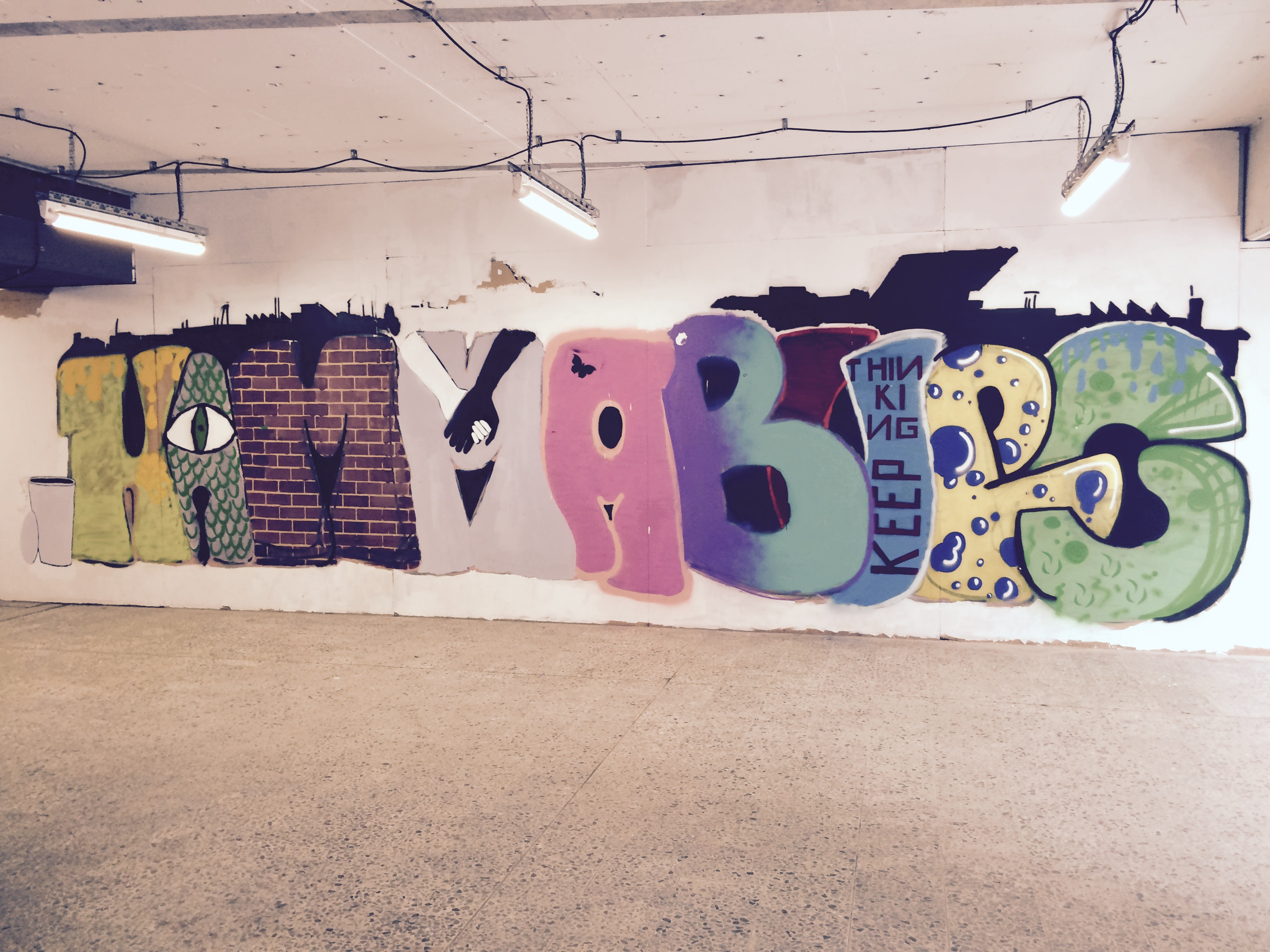 Graffitto im S-Bahnhof Altona, Hamburg